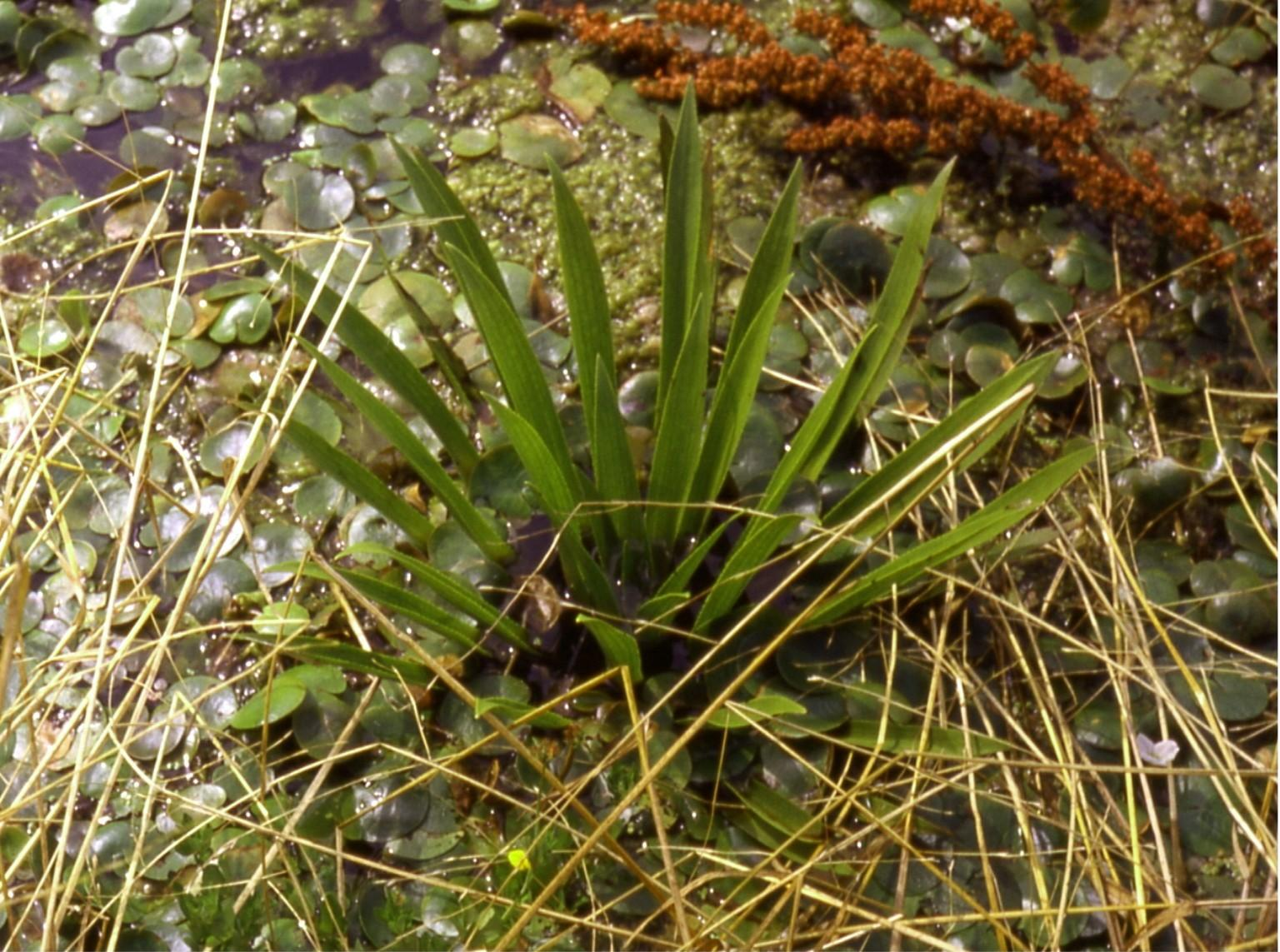 Beschreibung: Einzelne Rosette einer Krebsschere (Stratiotes aloides), umgeben von Schwimmblättern des nahe verwandten Froschbiss (Hydrocharis morsus-ranae). Quelle: Eigene Aufnahme von Juli 1982 aus Nordwest-Niedersachsen (Deutschland). Fotograf: Christian Fischer.